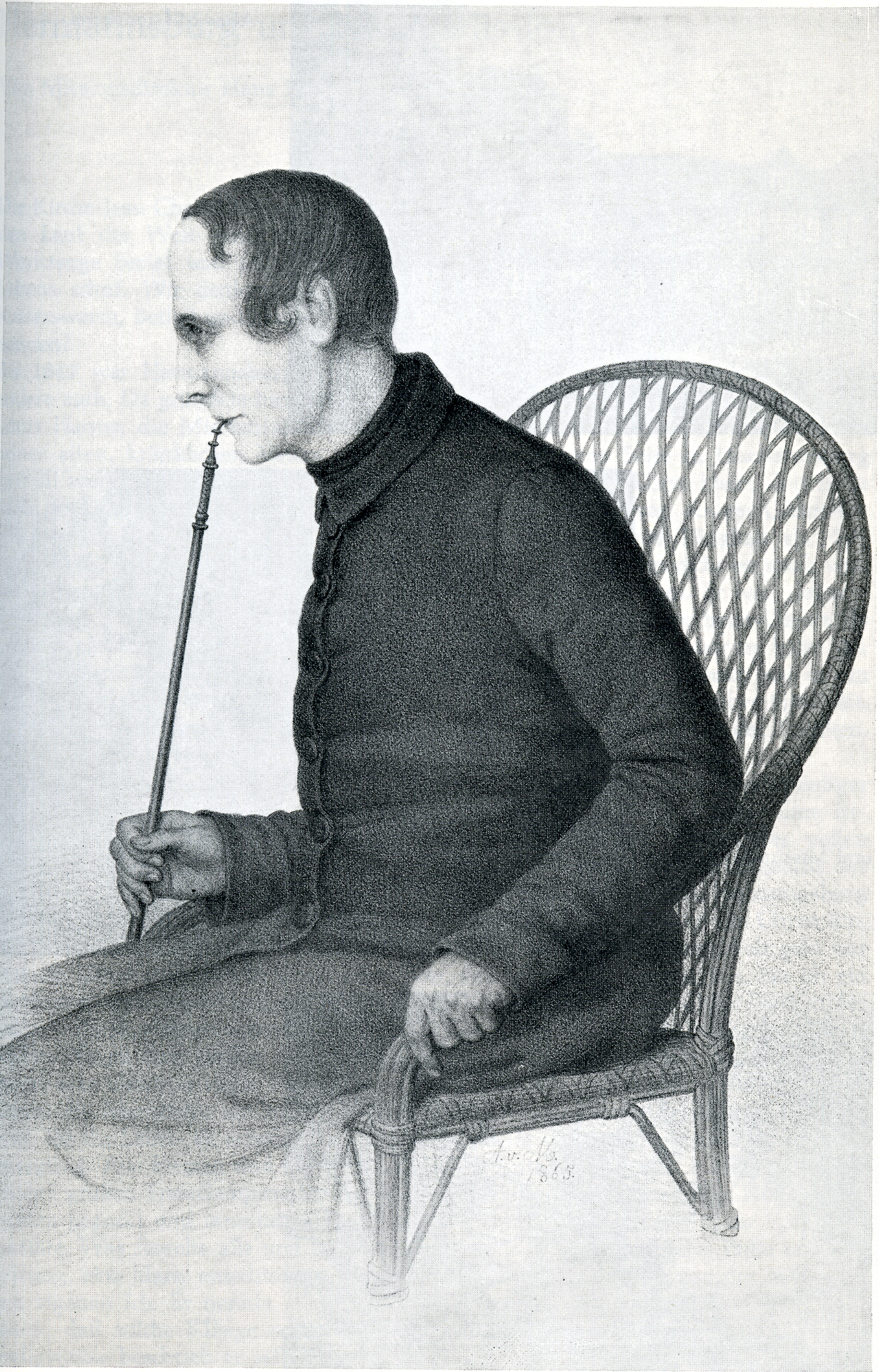 Portrait Ludwig Harms, auch: Louis Harms. Gründer u.a. der Hermannsburger Mission